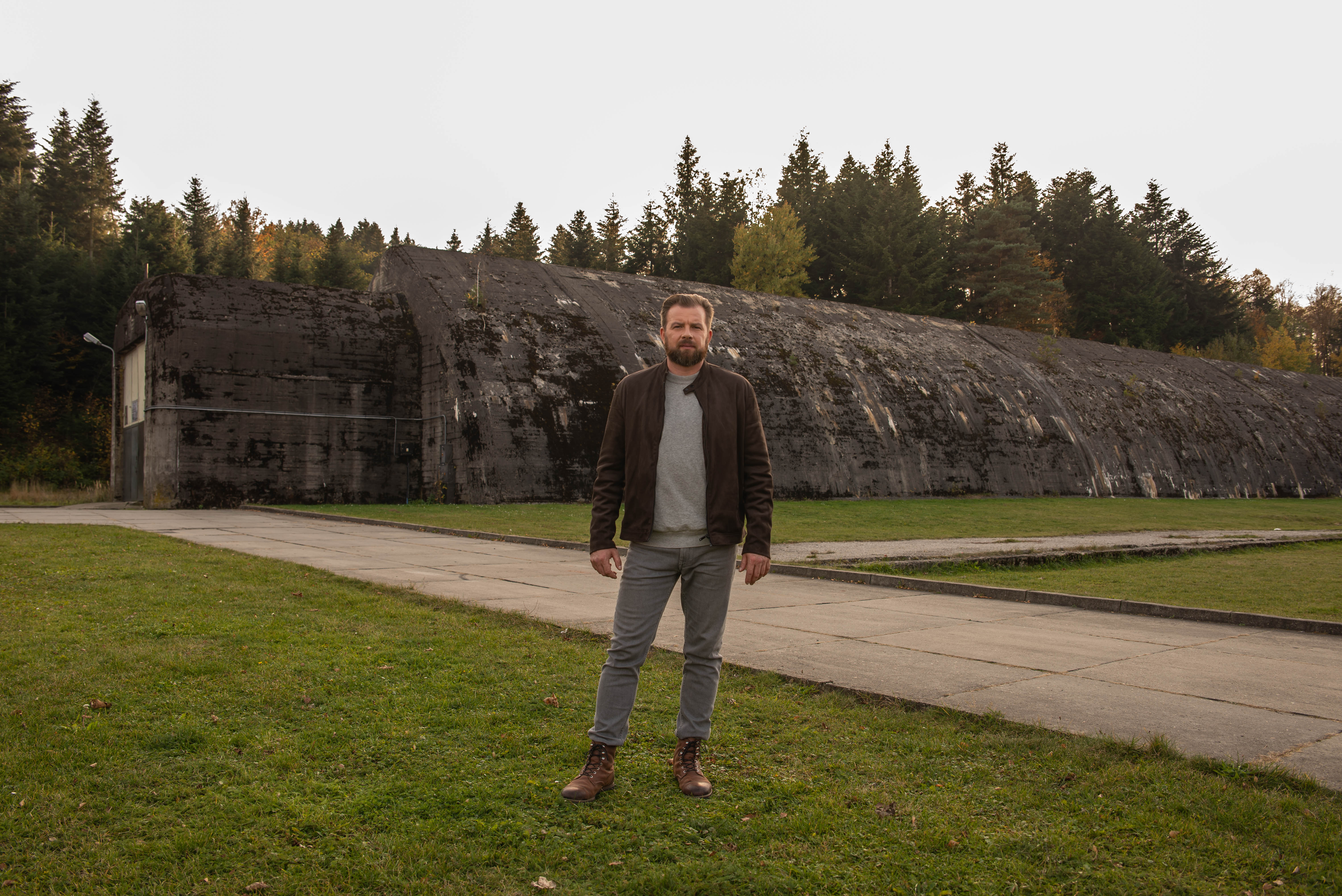 Kwatera główna Adolfa Hitlera w Stępinie-Cieszynie i Strzyżowie w województwie podkarpackim, zbudowana w czasie II wojny światowej.